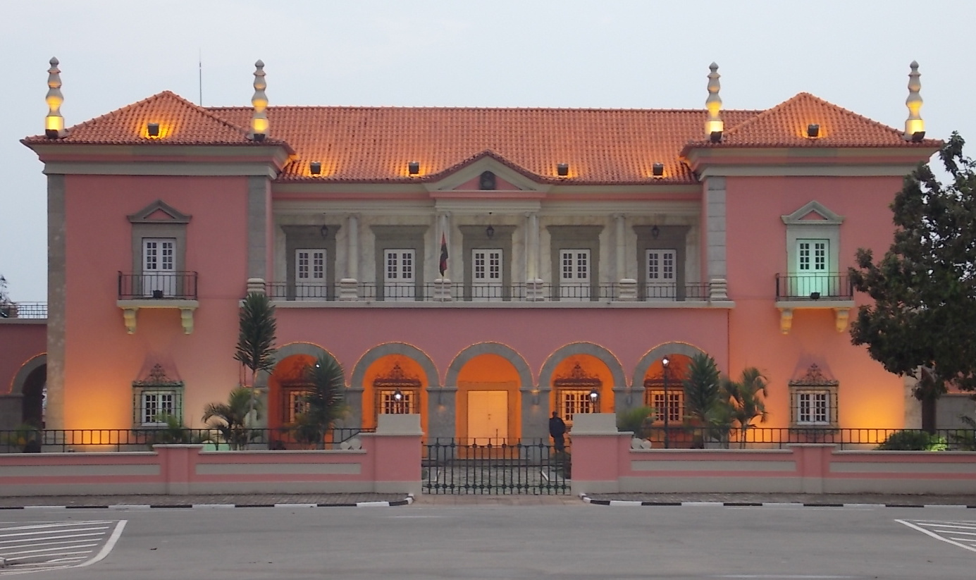 Palácio do Governador, Cidade Alta, Huambo, Angola